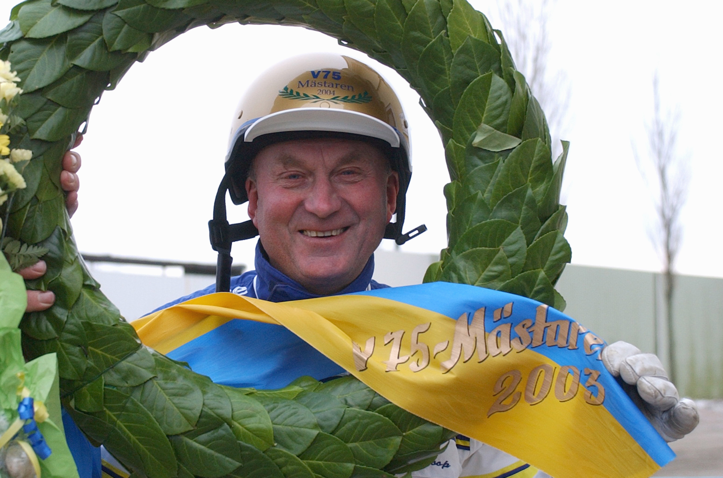 Travkusken Olle Goop med krans och hjälm från tidigare vinster i V75-Mästaren.